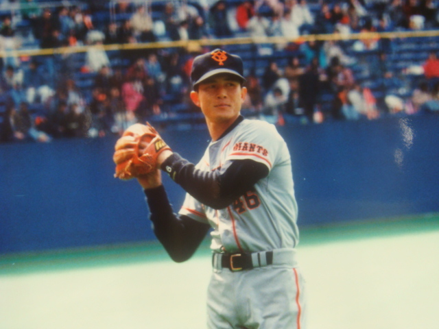 読売巨人軍